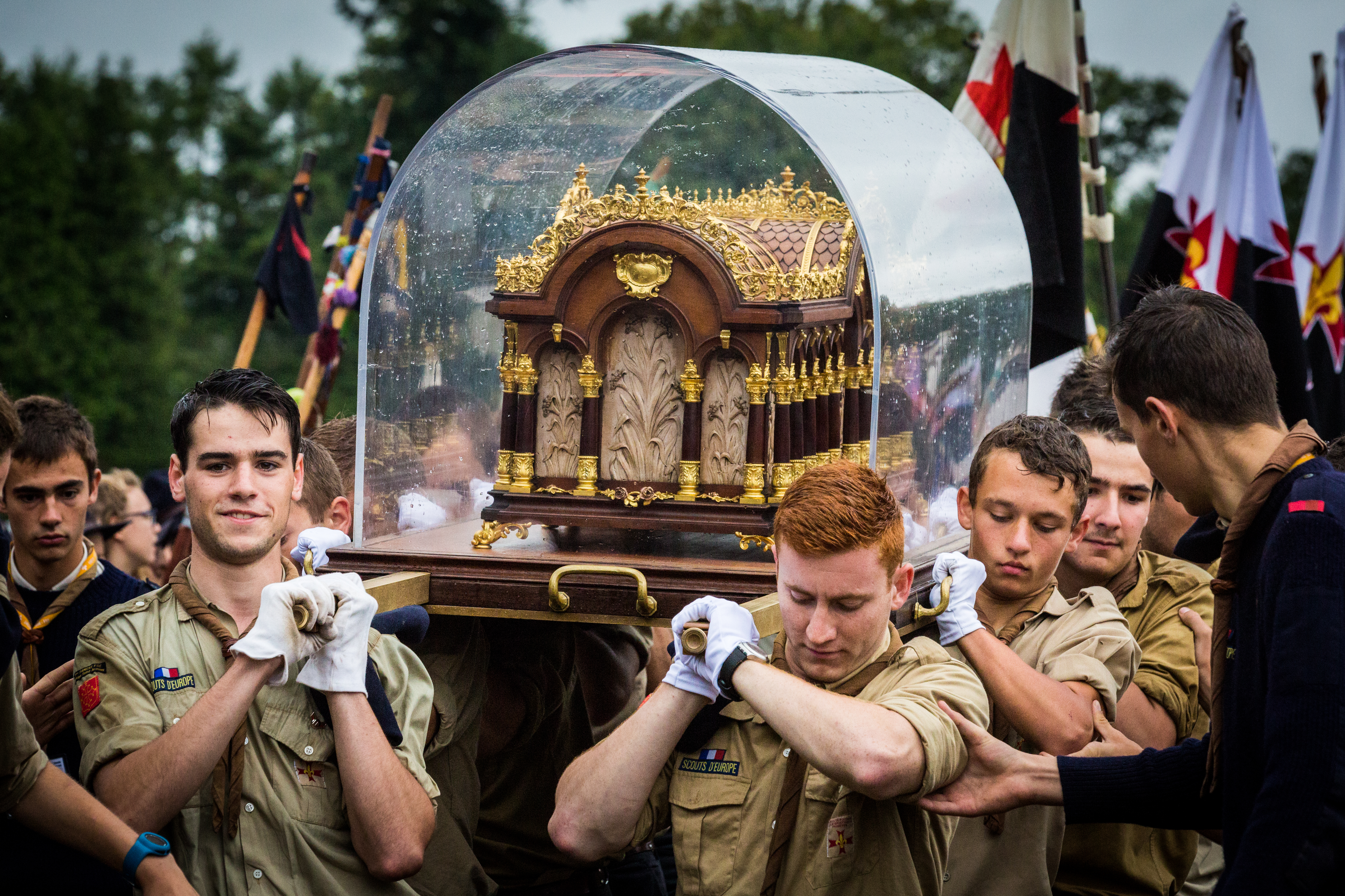 Eurojam 2014 cérémonie de cloture 10 août 2014